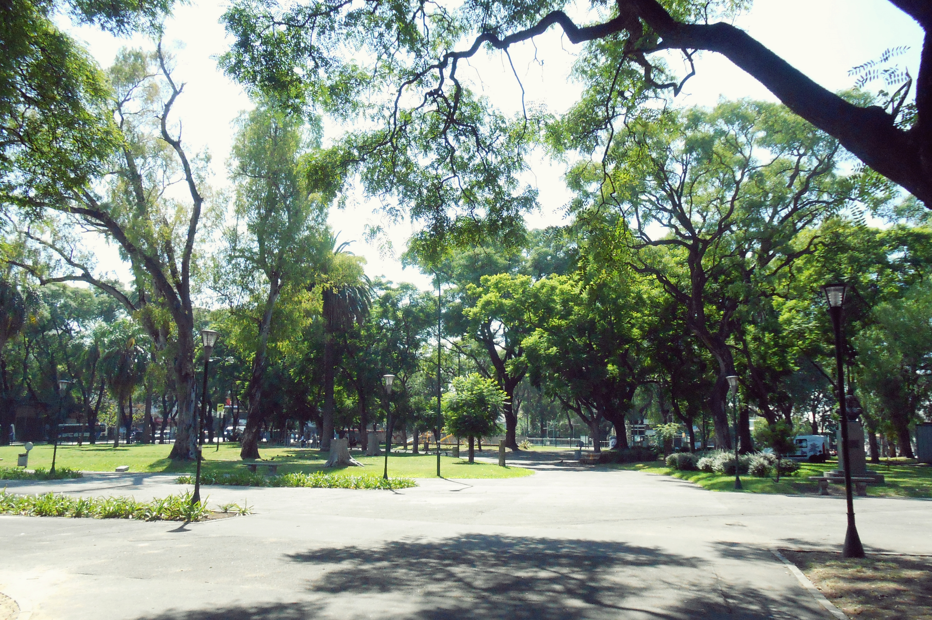 Parque de los Patricios - Buenos Aires, Argentina.